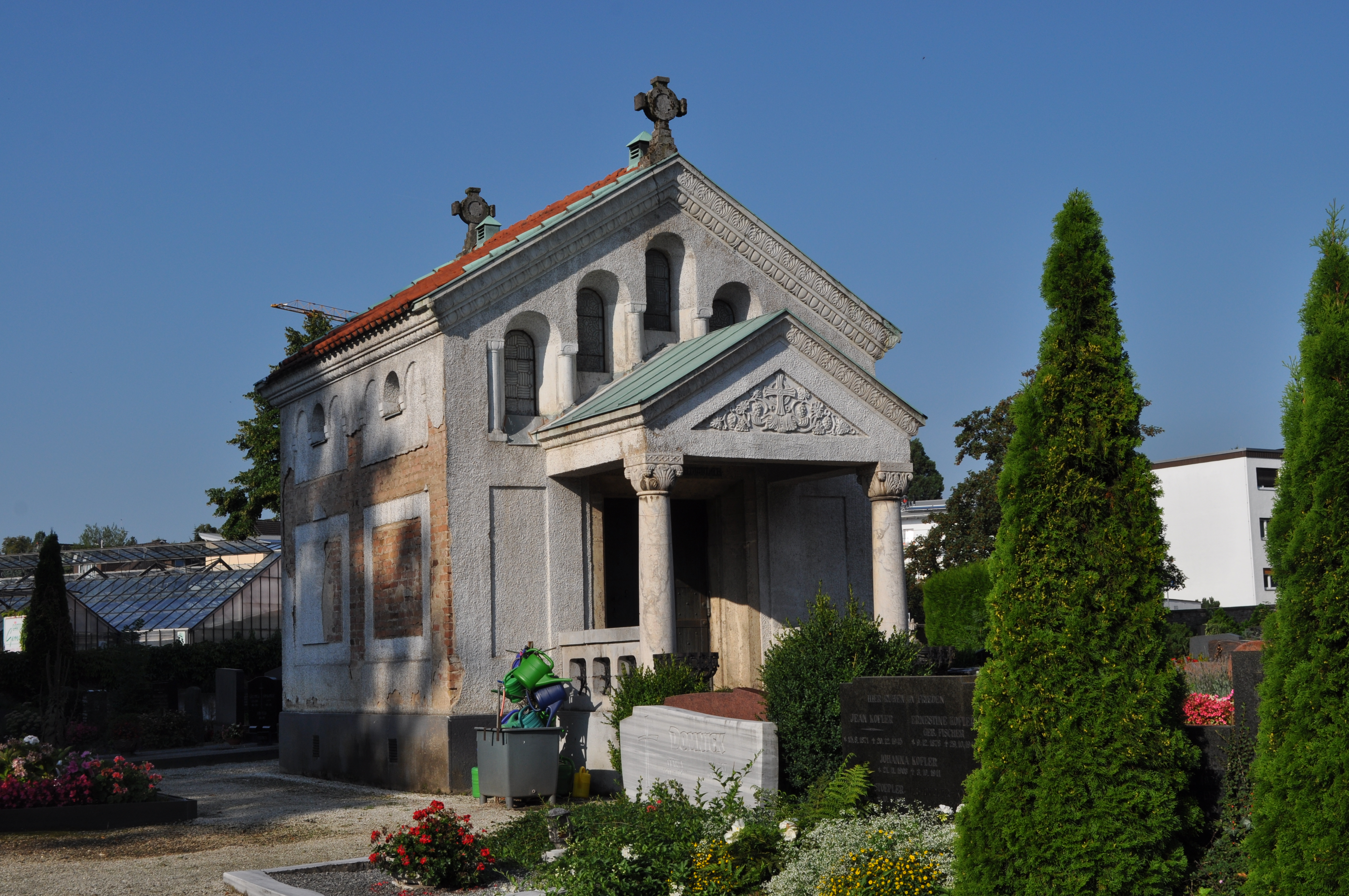 Bad Homburg, Evangelischer Friedhof, Saalburgstraße, Kapelle